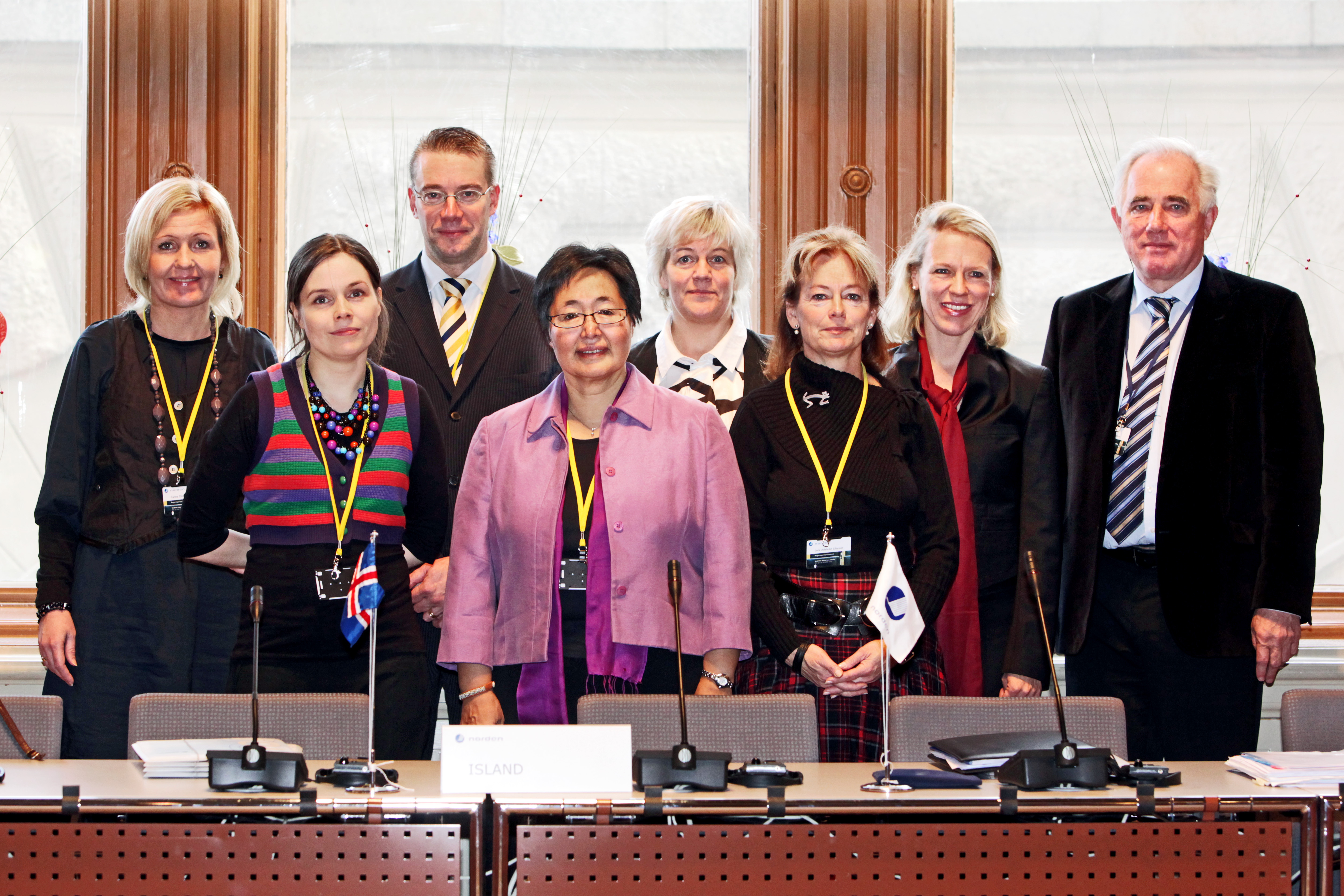 De nordiska ländernas och de självstyrande områdenas kulturministrar samt Nordiska Ministerrådets generalsekreterare vid Nordiska Rådets session i Stockholm.